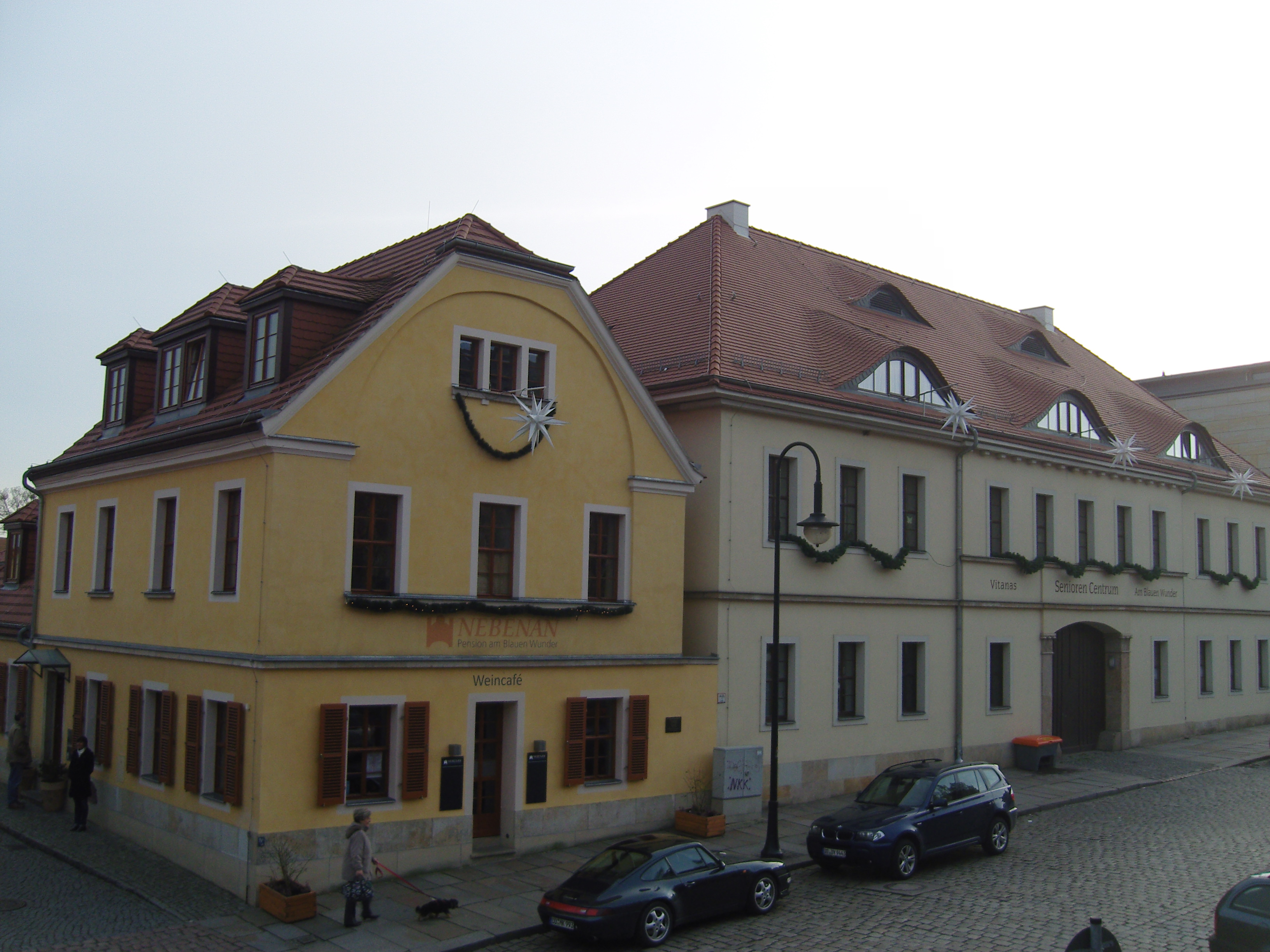 Denkmalgeschütztes Gebäude am Schillerplatz 10 in Dresden-Blasewitz